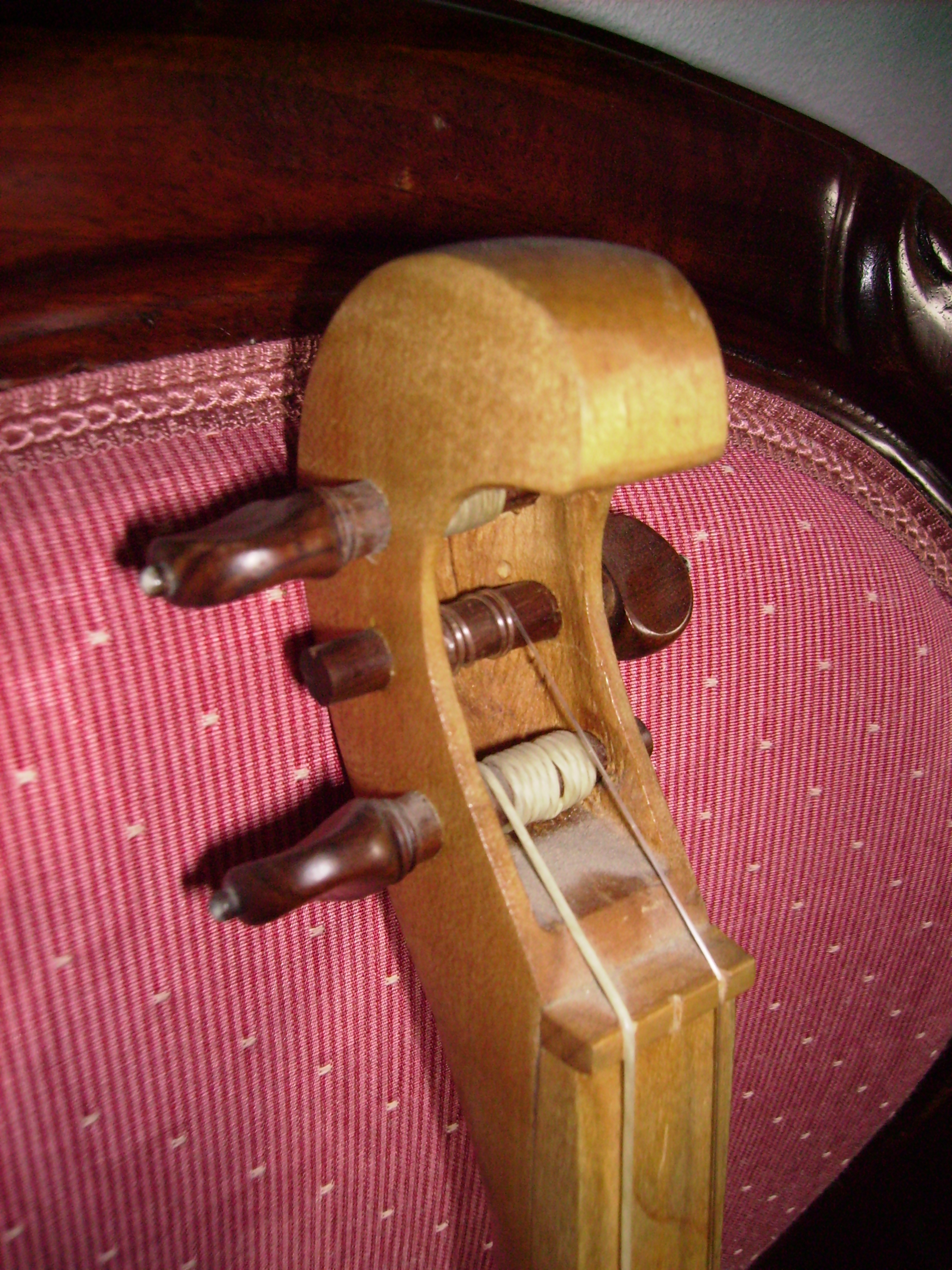 Wirbelkasten eines dreisaitigen Rebec